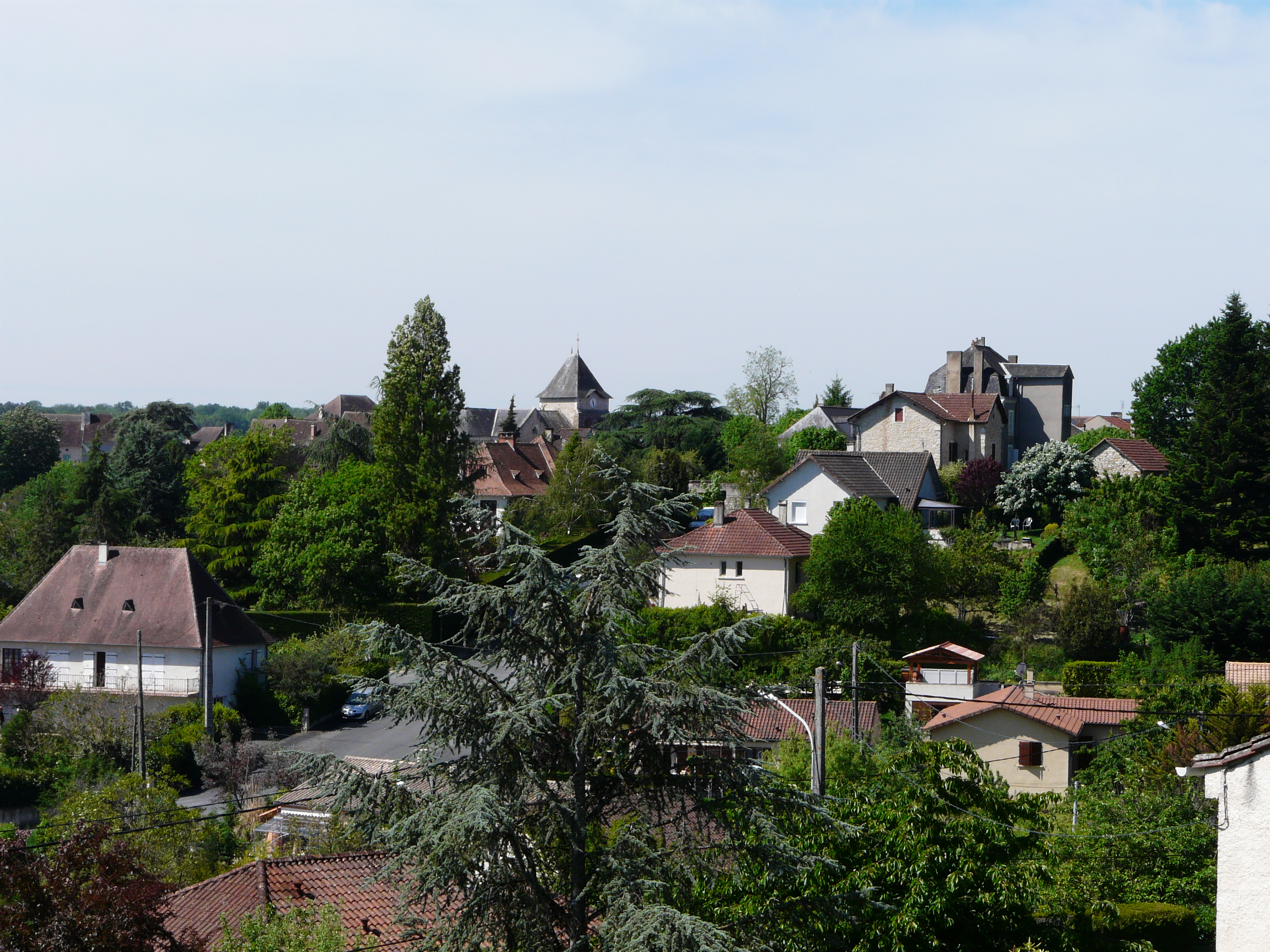 Le bourg de Thenon, Dordogne, France.